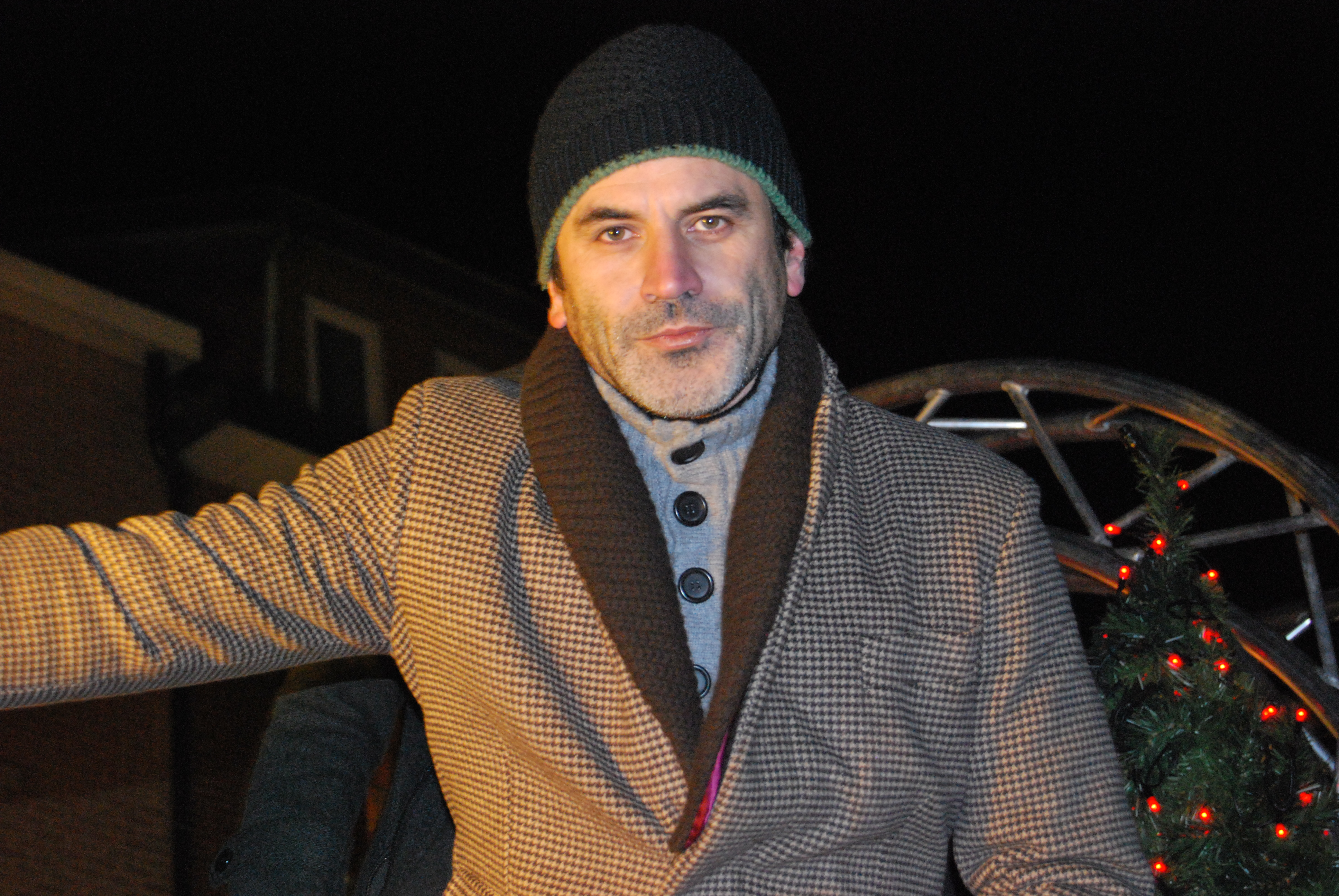 Guy Van Sande tijdens de VTM kerstparade in Genk 2008